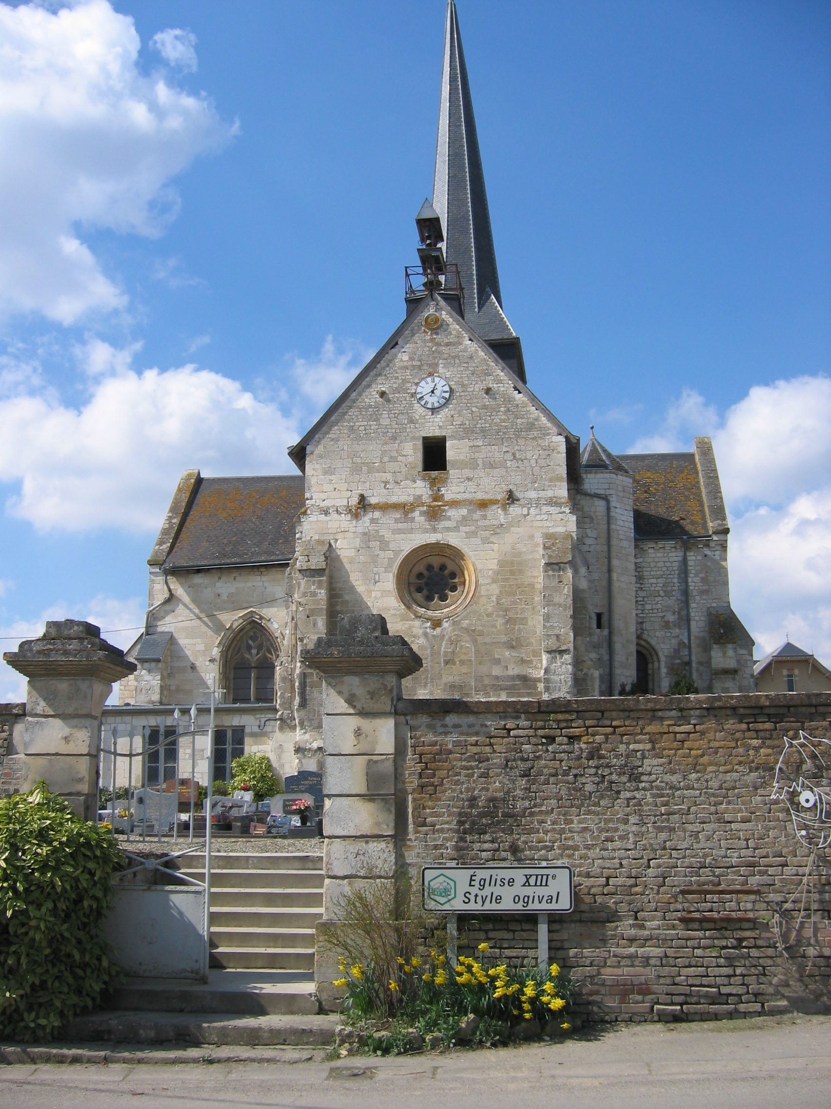 Eglise de Villers-devant-Le-Thour, Ardennes, France